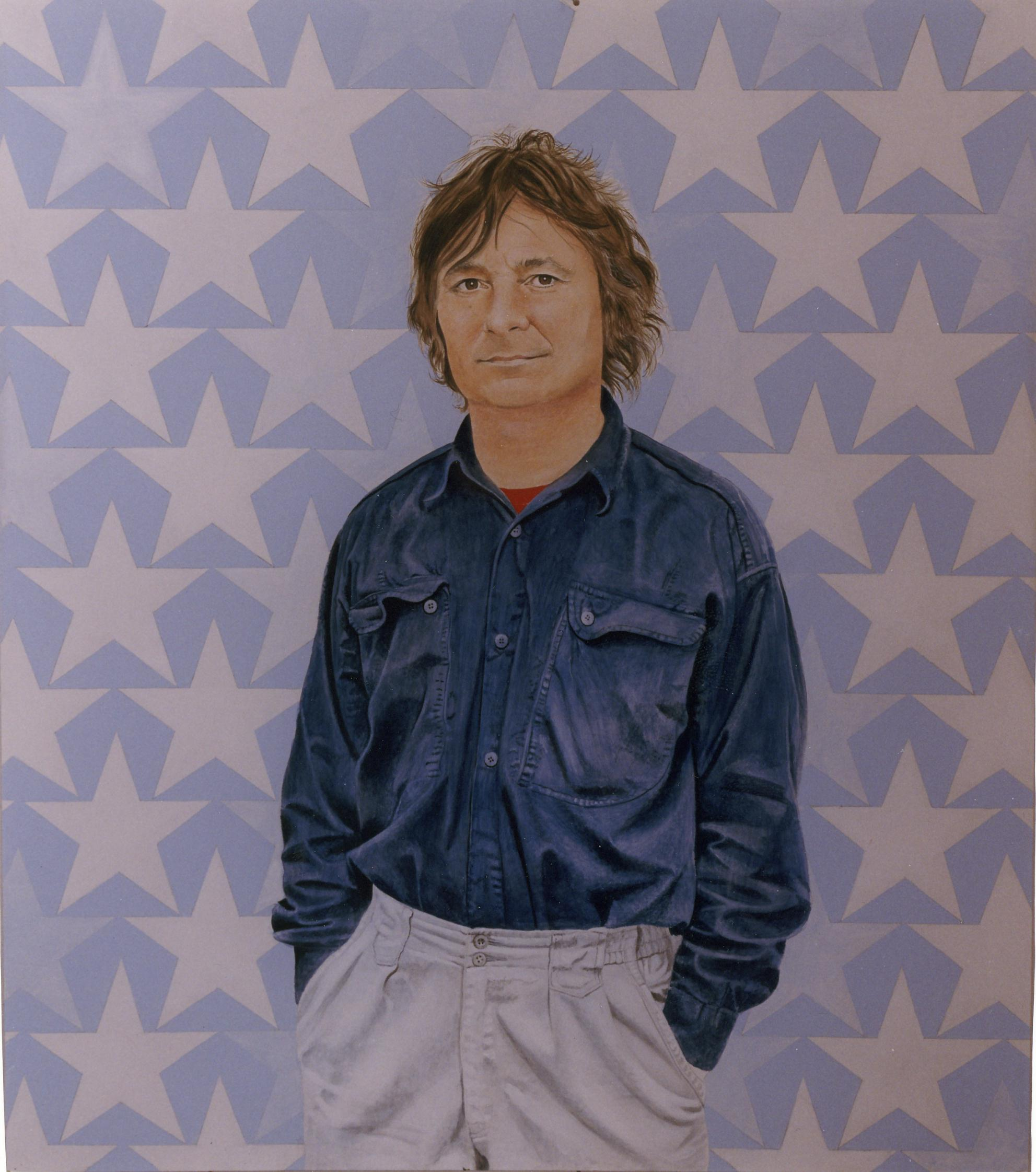 Peinture autoportrait